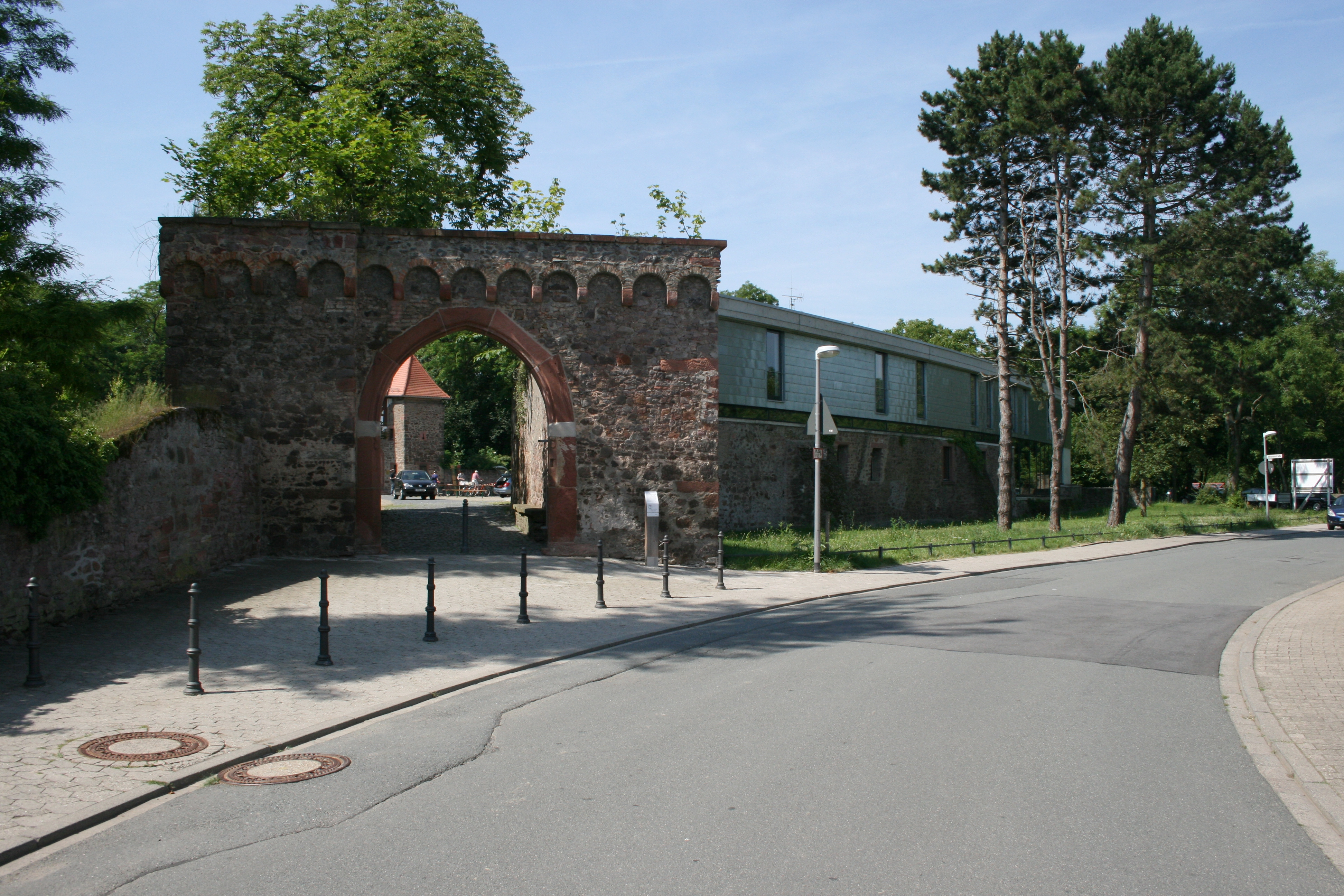 Schloss Dornberg bei Groß-Gerau in Hessen. Ansicht des Torbaus der Vorburg, rechts moderne Anbauten der Volkshochschule.